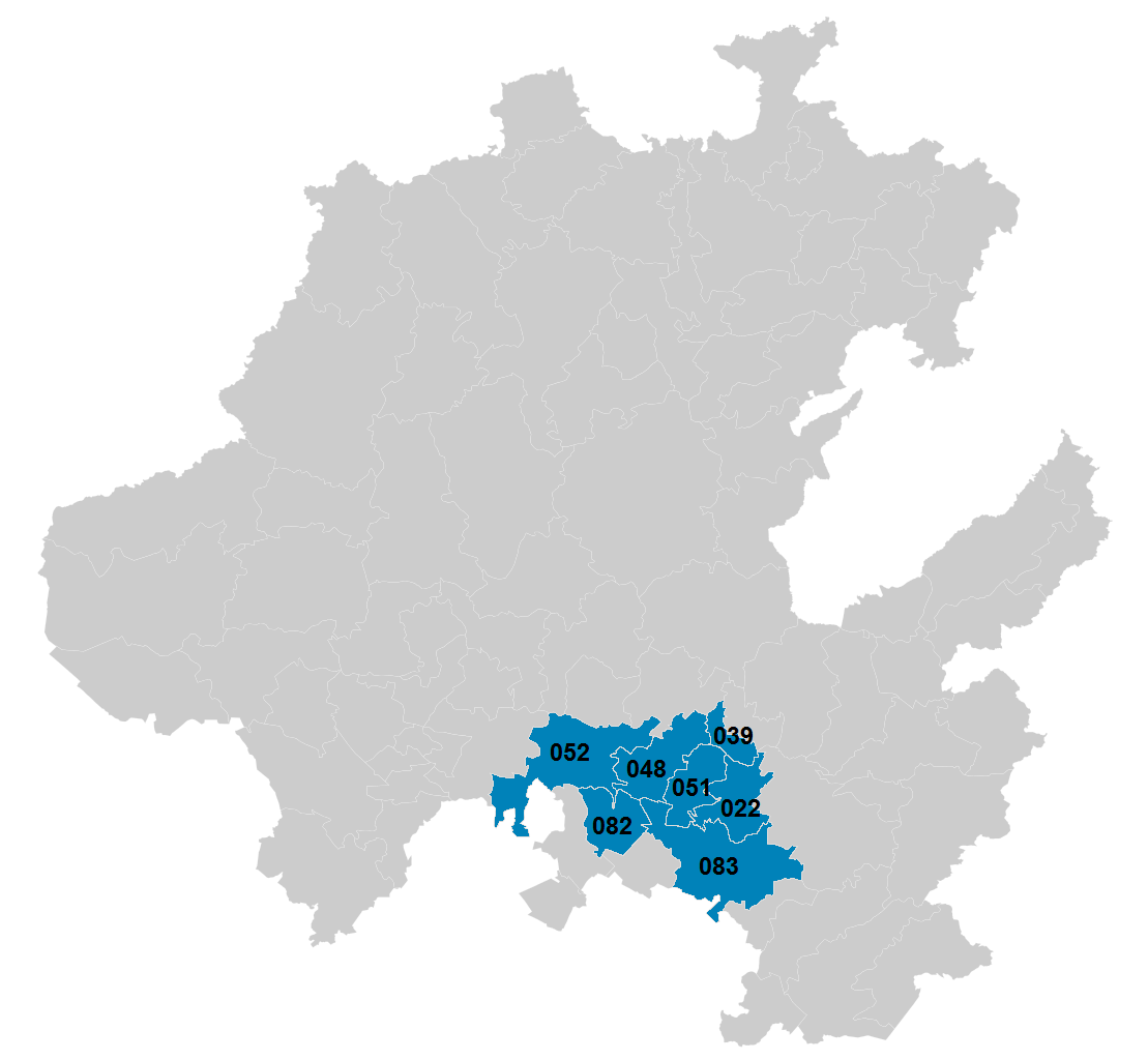 Municipios de la Zona metropolitana de Pachuca.